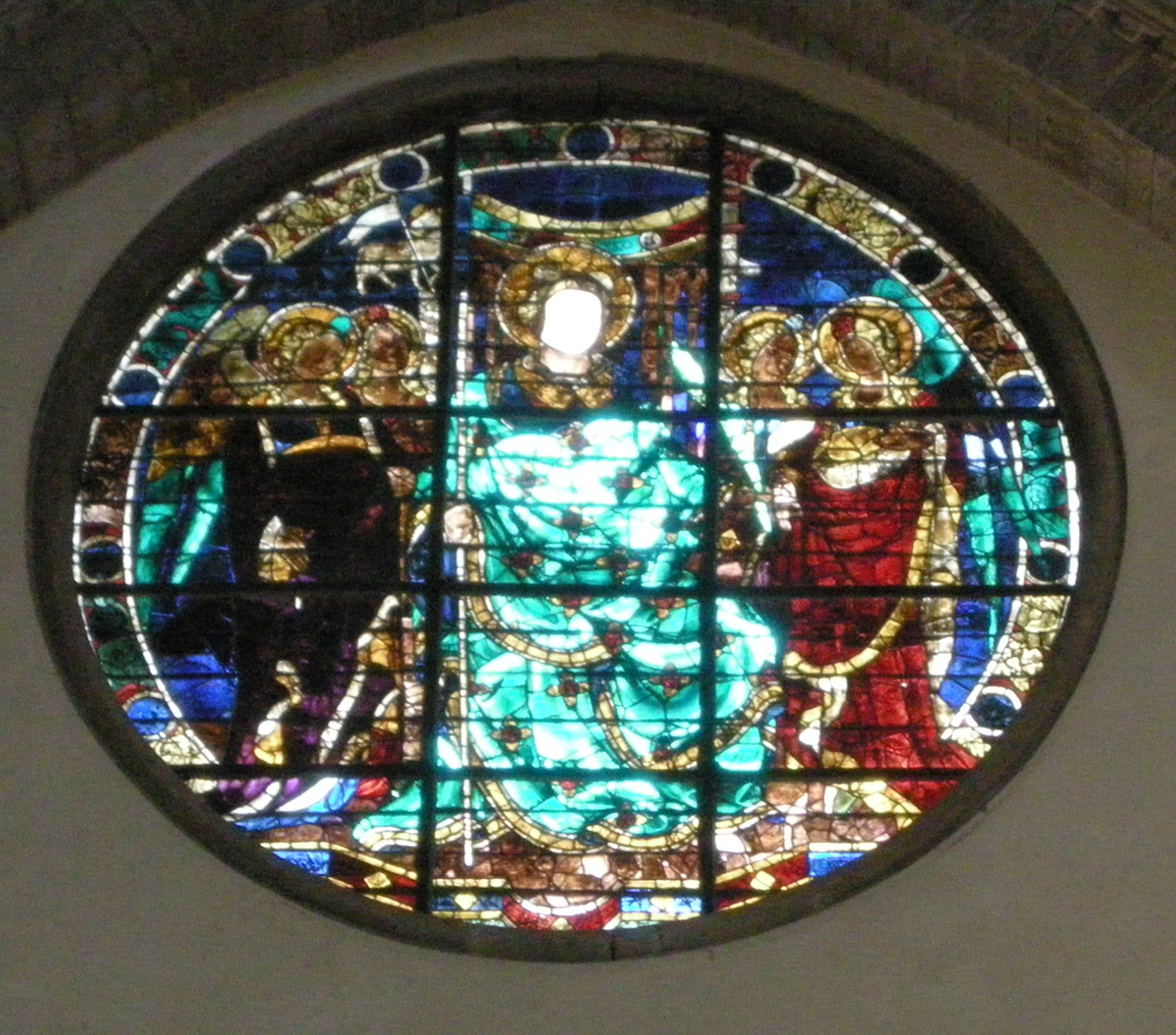 Smf, vetrata san lorenzo, cartone di l. ghiberti